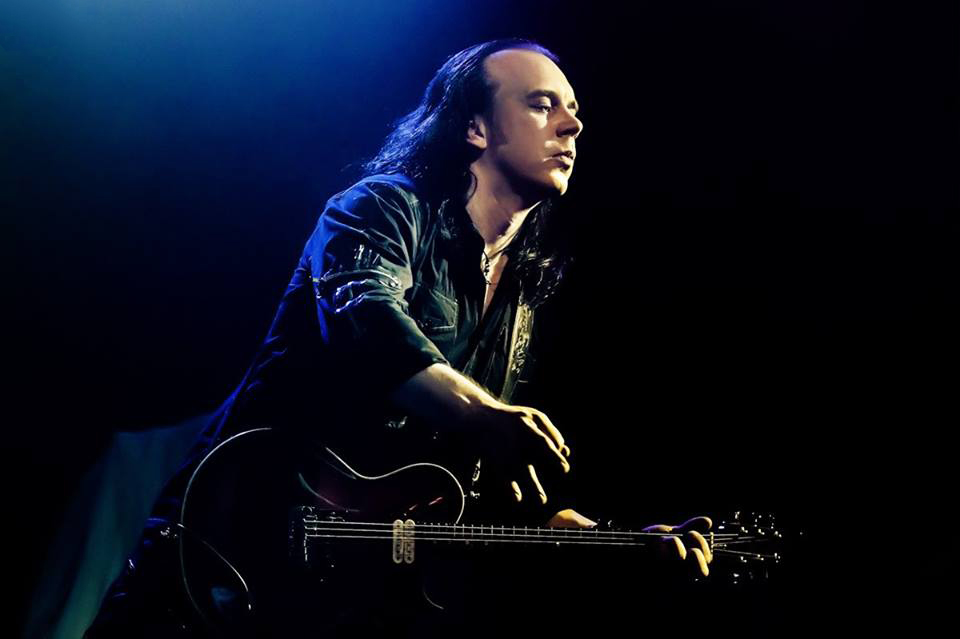 Henrik Flyman, Evil Masquerade, Lacrimosa.